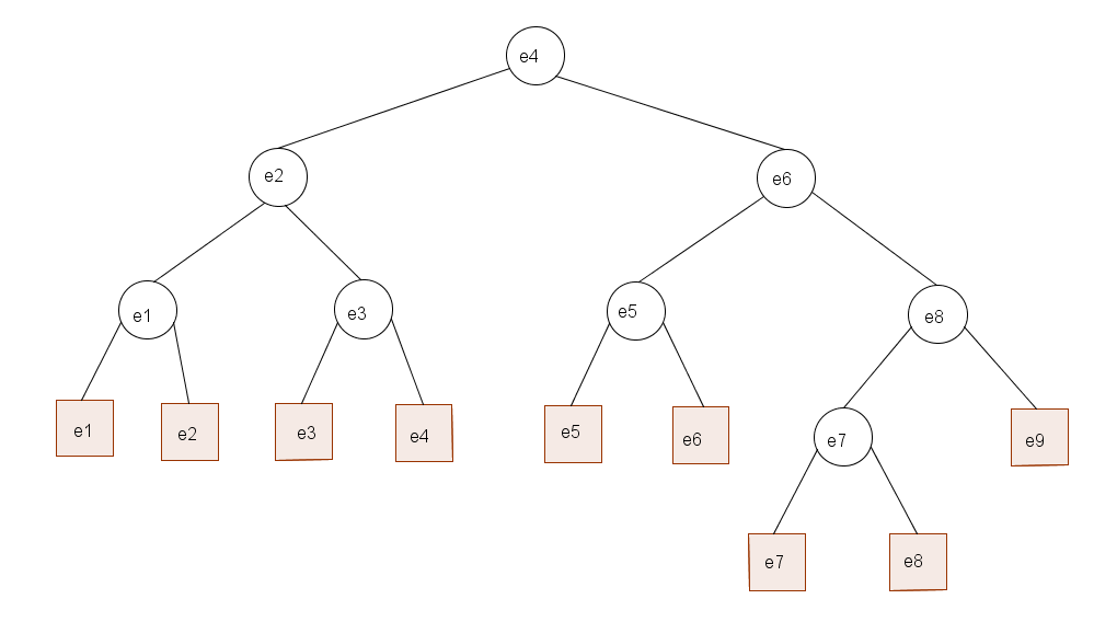 Árbol binario que muestra los segmentos de recta del algoritmo de insersección de segmentos.